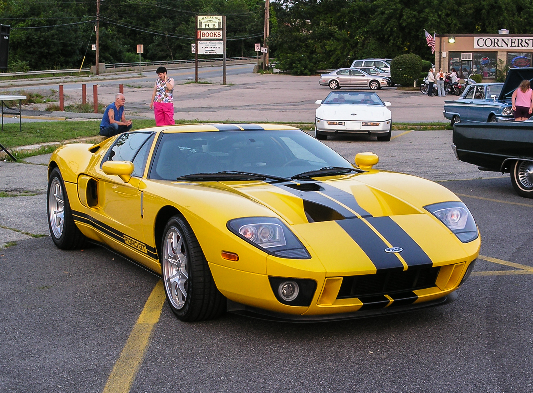 Auto in Warwick (Rhode Island, USA)